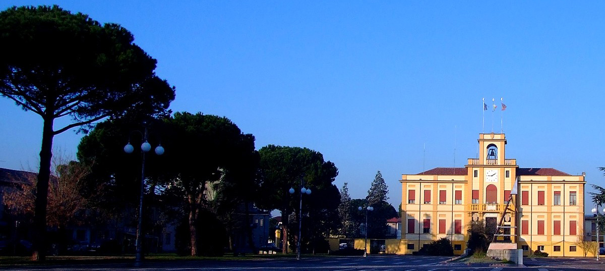 Porto Viro: Piazza della Repubblica e sede municipale.